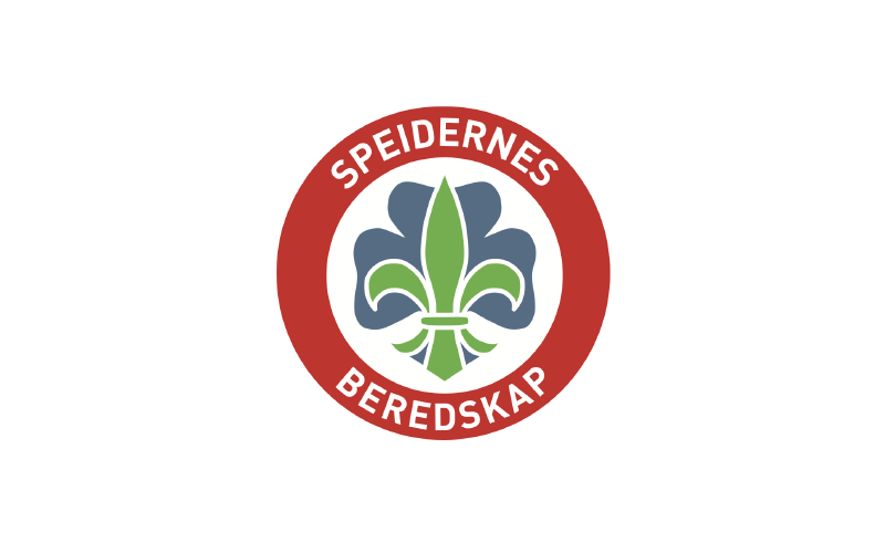 Logo til Speidernes beredskap - ett nettverk i Norges Speiderforbund